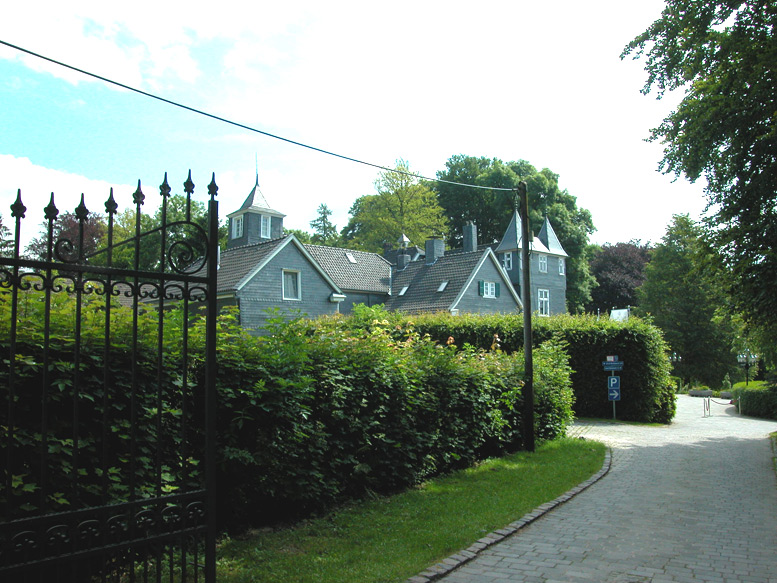 Bei Itterquelle (Haus Grünewald) ru: У истока Иттера. Дом Грюневальд. Частное владение, вход со всех сторон воспрещён.